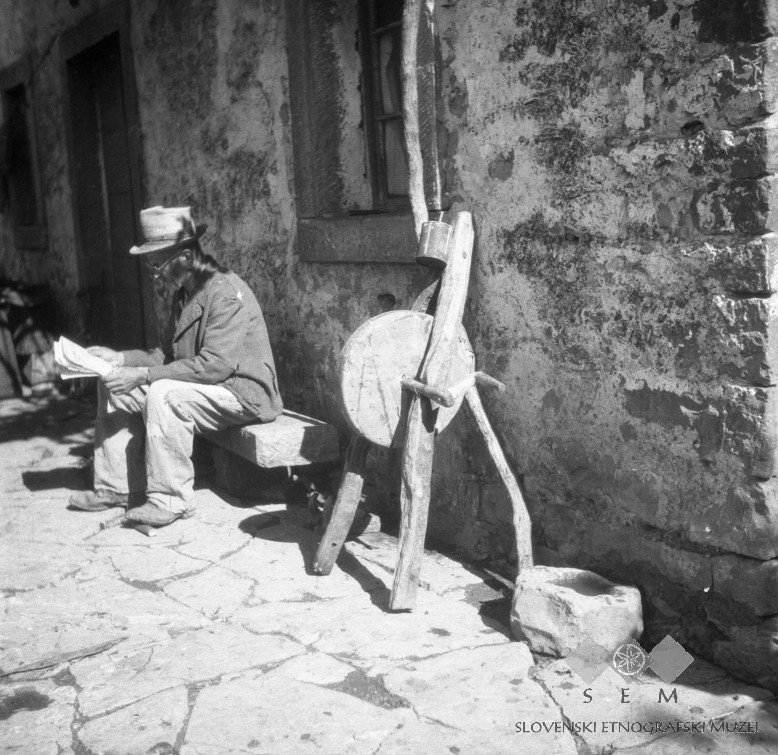 Brus pri Zajcu, Tinjan.